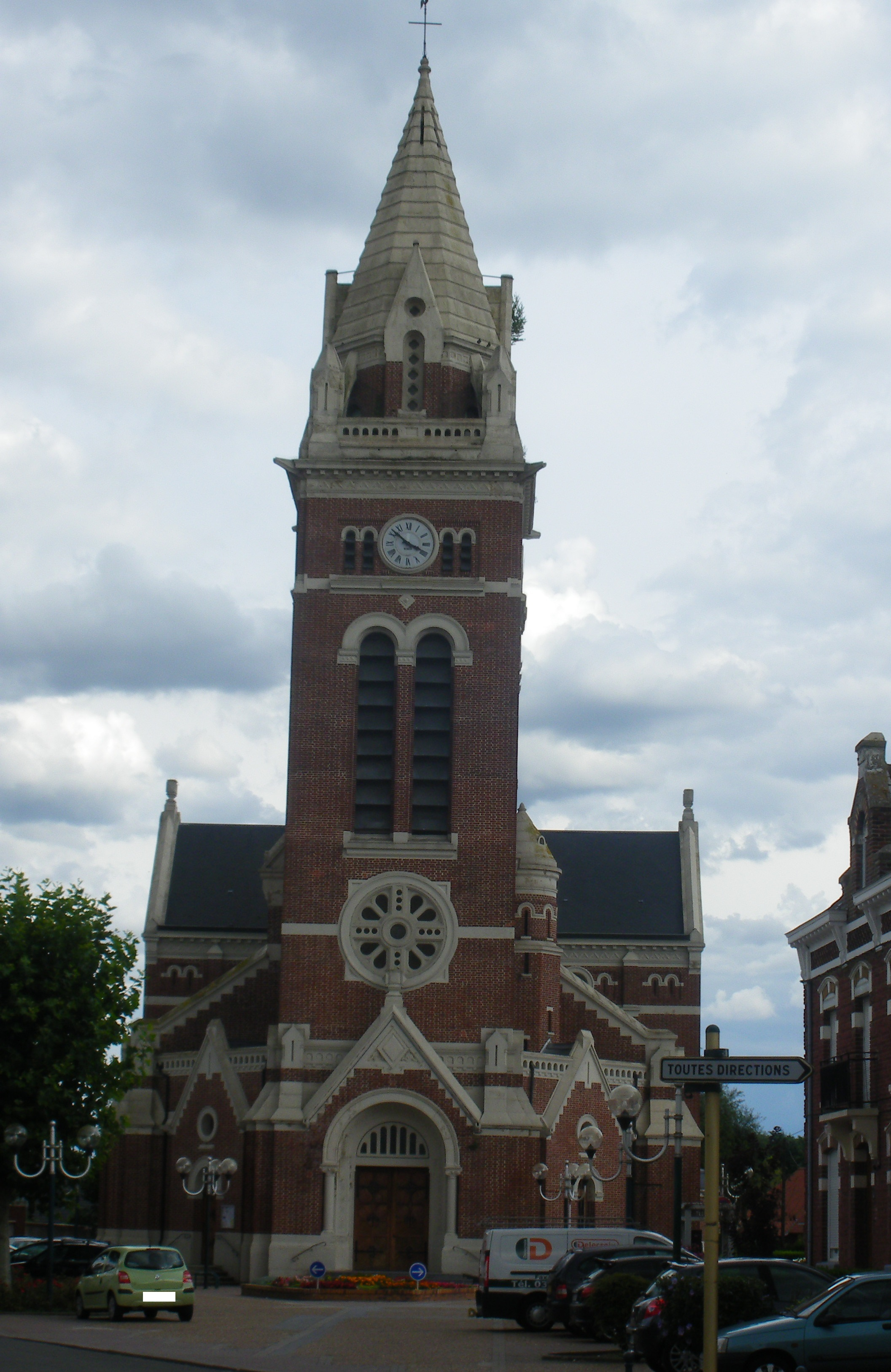 Vue de l'église Saint-Léger de Vendin-le-Vieil.